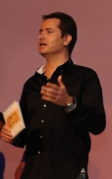 Acun Ilıcalı Danone Danino Lansmanında.